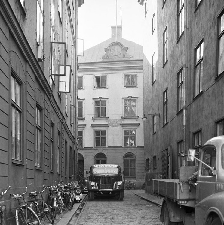 Gaffelgränd från Skeppsbron. I fonden Stockholms Sjömanshus, Gaffelgränd 1A.